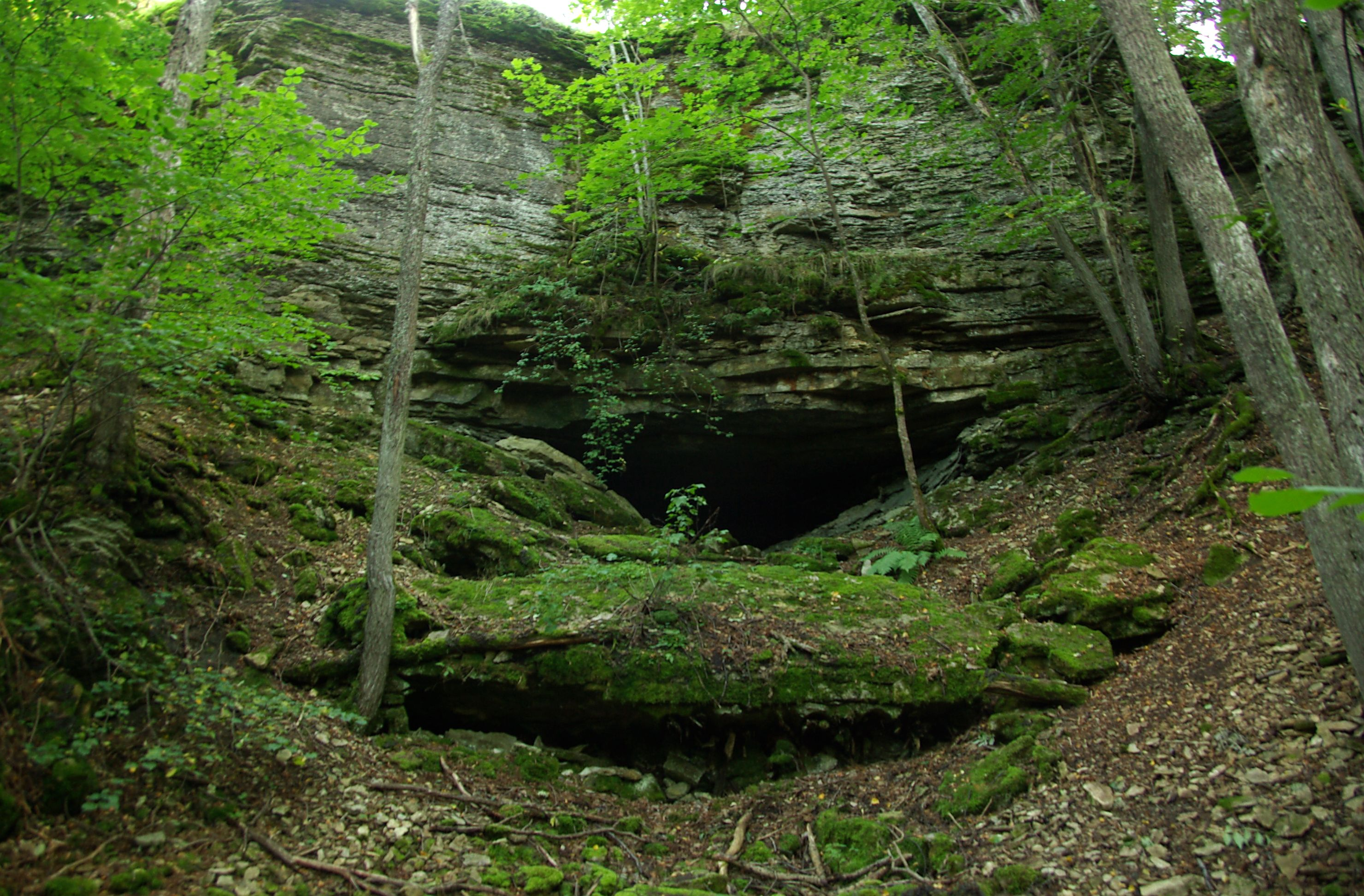 Naage koobas või õigemini koopad asuvad Naage maastikukaitsealal Naage külas,koopad jäävad Harku-Keila-Joa matkarajale